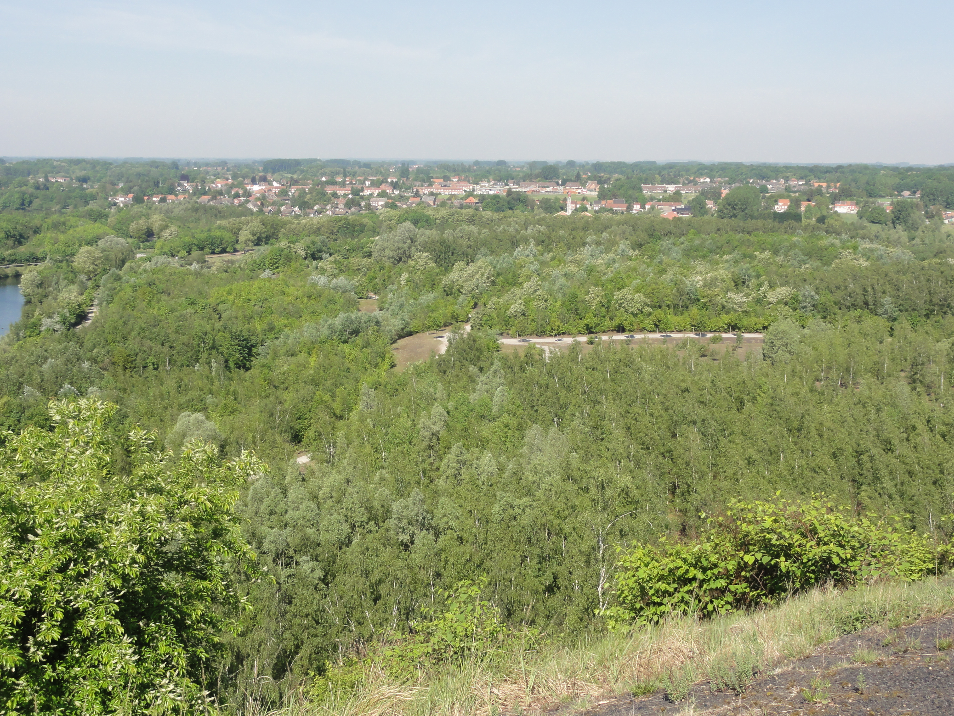 Terril n° 195A dit Ledoux Moulineaux, Fosse Ledoux de la Compagnie des mines d'Anzin, Condé-sur-l'Escaut, Nord, Nord-Pas-de-Calais, France.